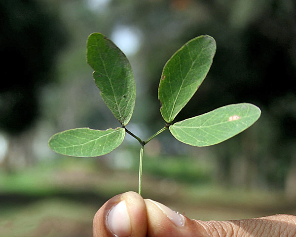 Jungle Jalebi Pithecellobium dulce in Kolkata, West Bengal, India.